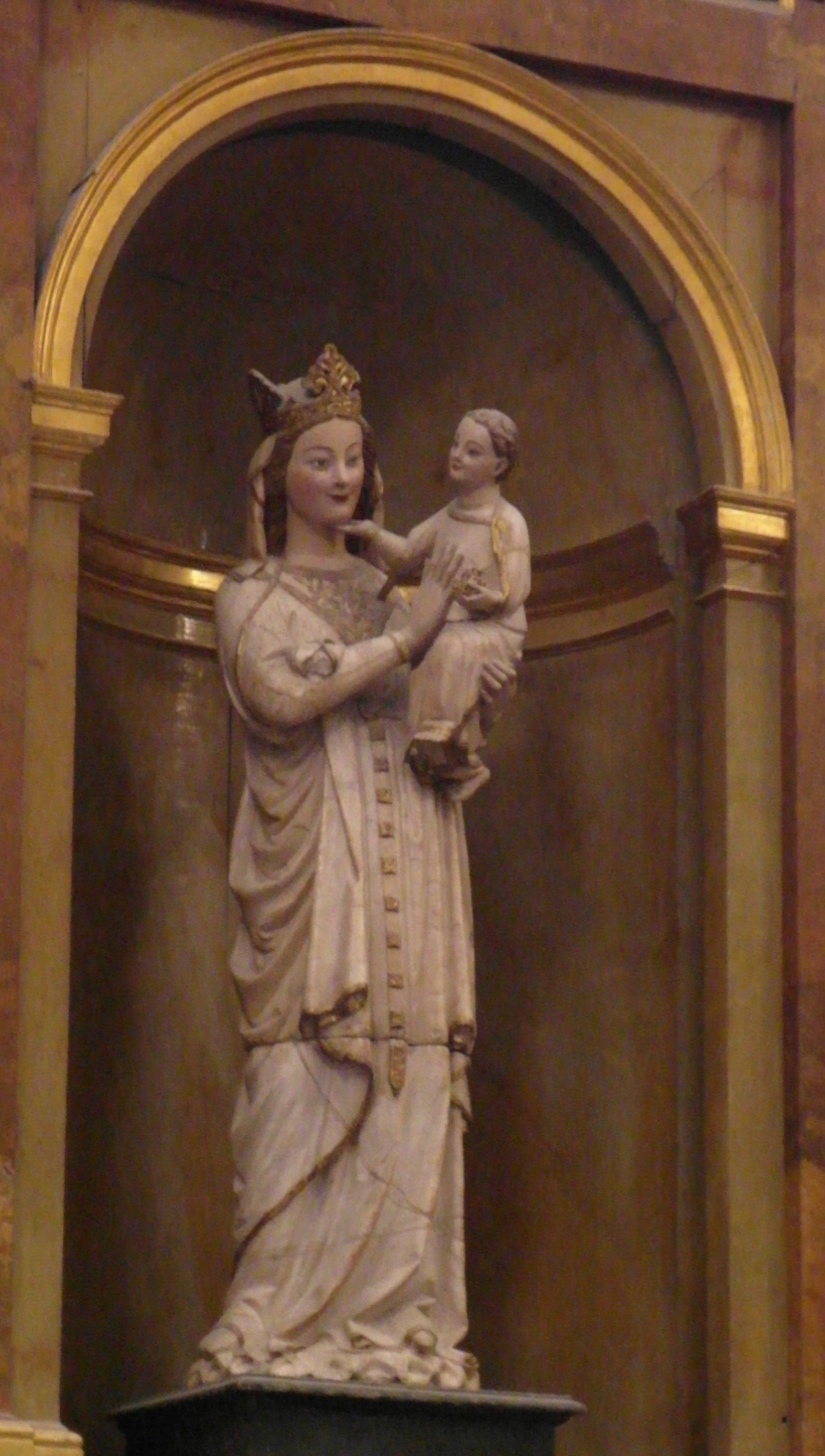 Catedral de Palencia.